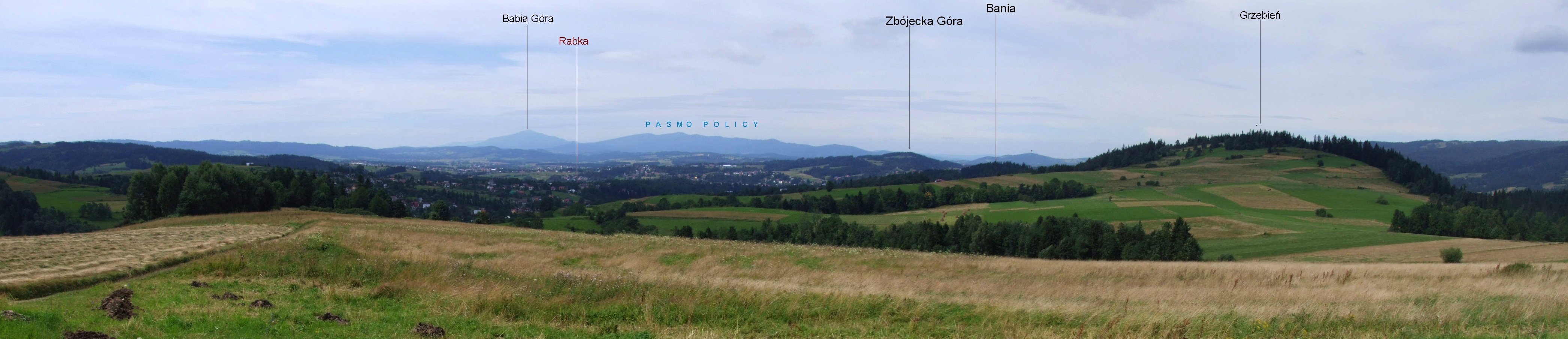 Kotlina Rabczańska. Widok z grzbietu Grzebień - Szumiąca